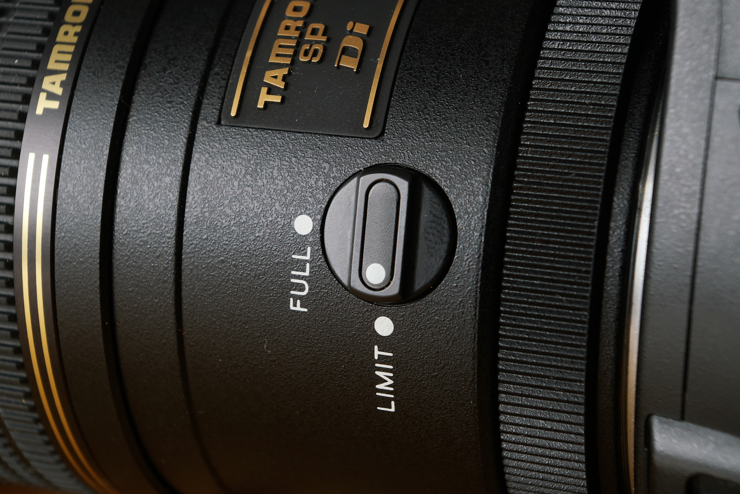 Schalter zur Begrenzung des Einstellbereichs des Autofokus an einem Makroobjektiv